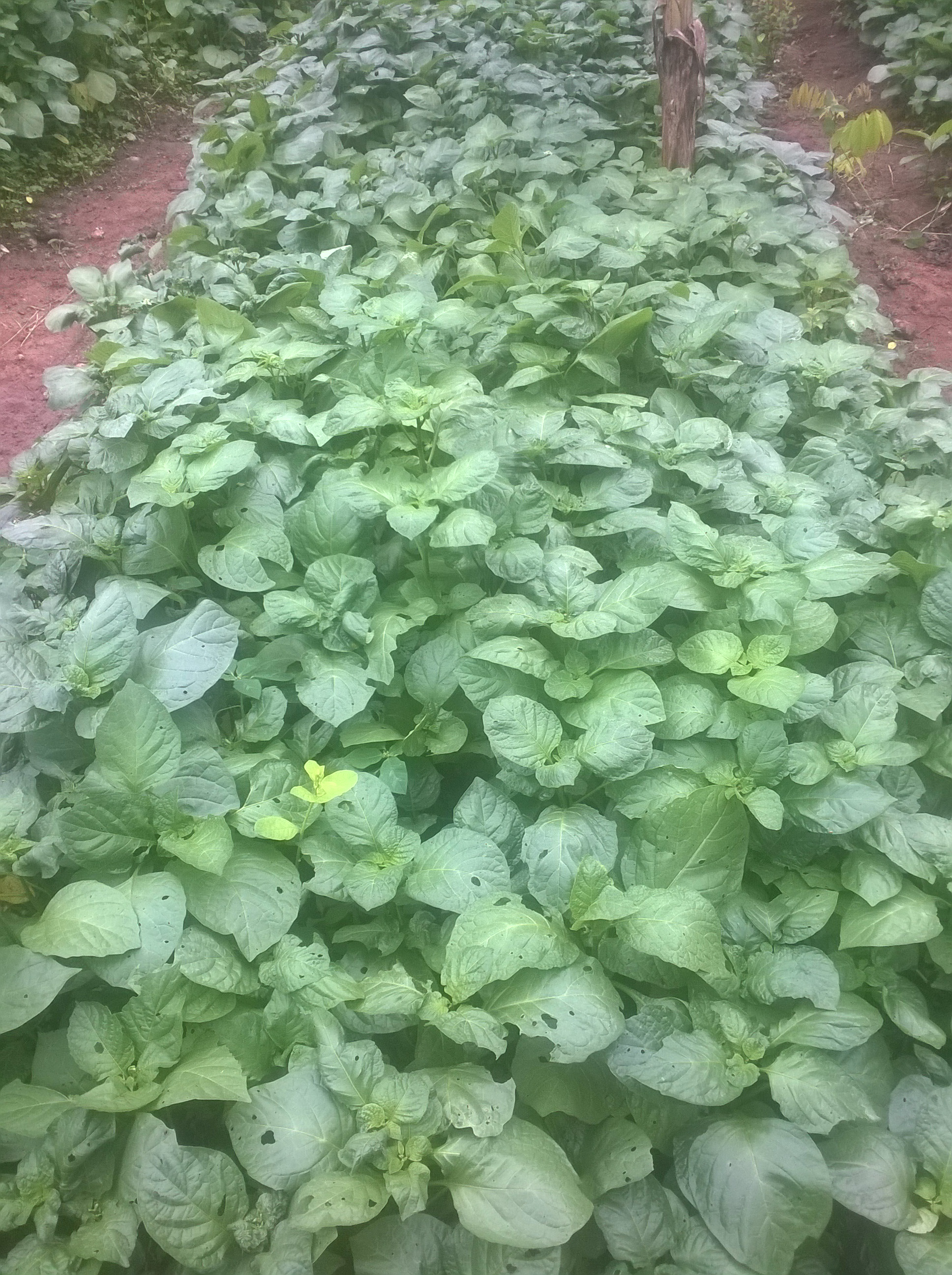 Légumes"zoom"